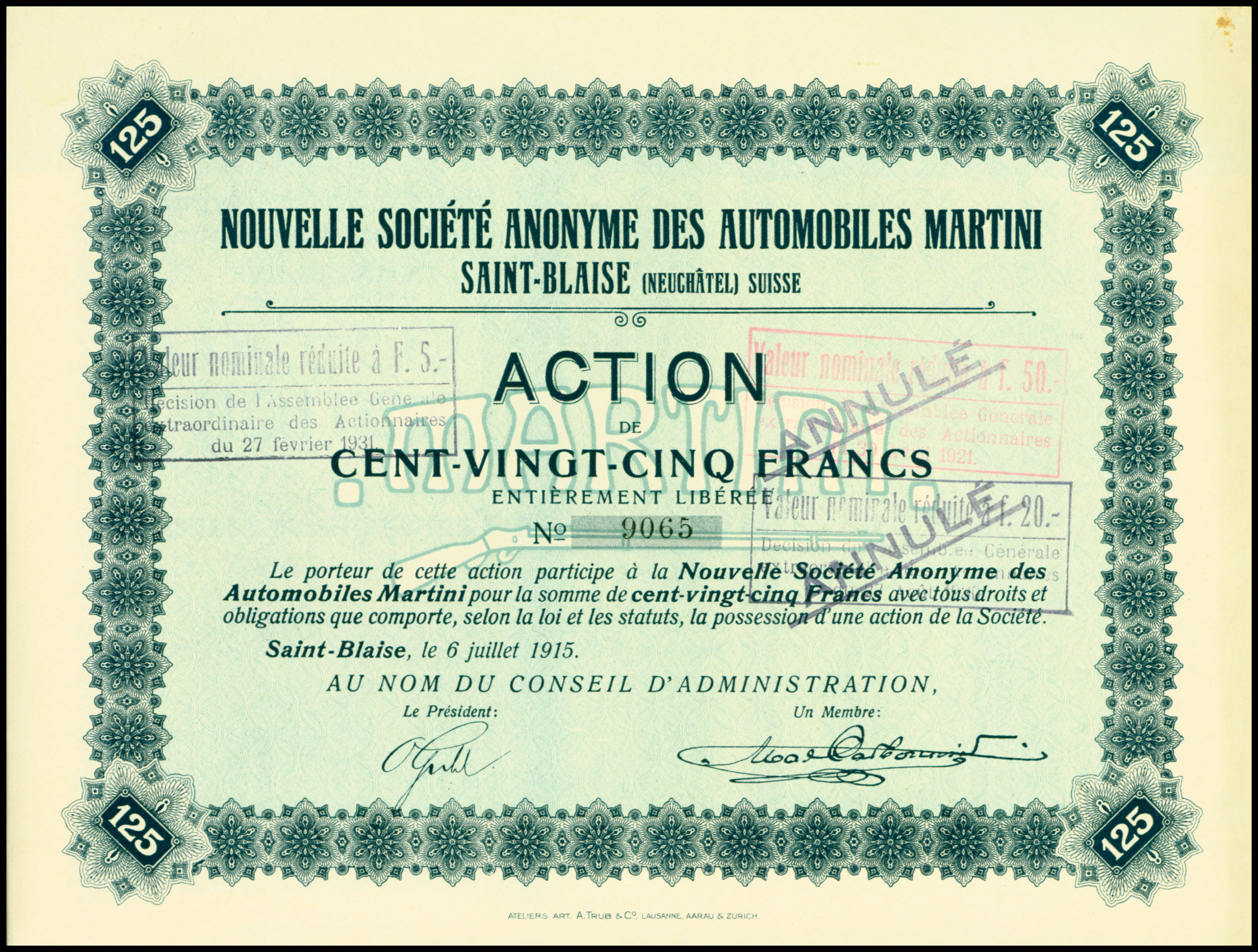 Aktie über 125 Franken der Nouvelle SA des Automobiles Martini vom 6. Juli 1915